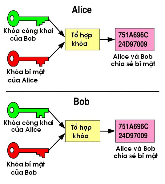 Thoả thuận về khoá